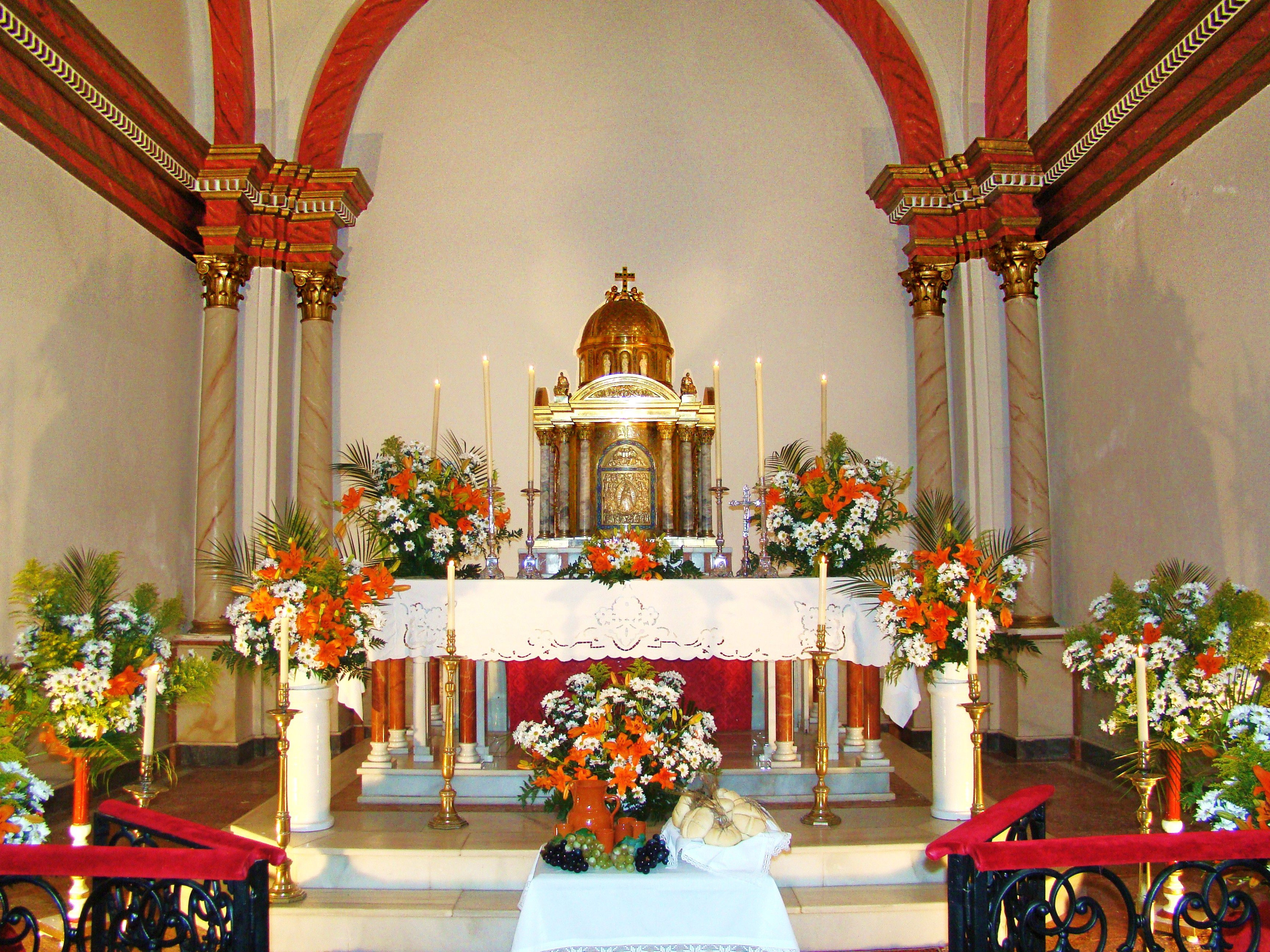 Sagrario Santa Ana